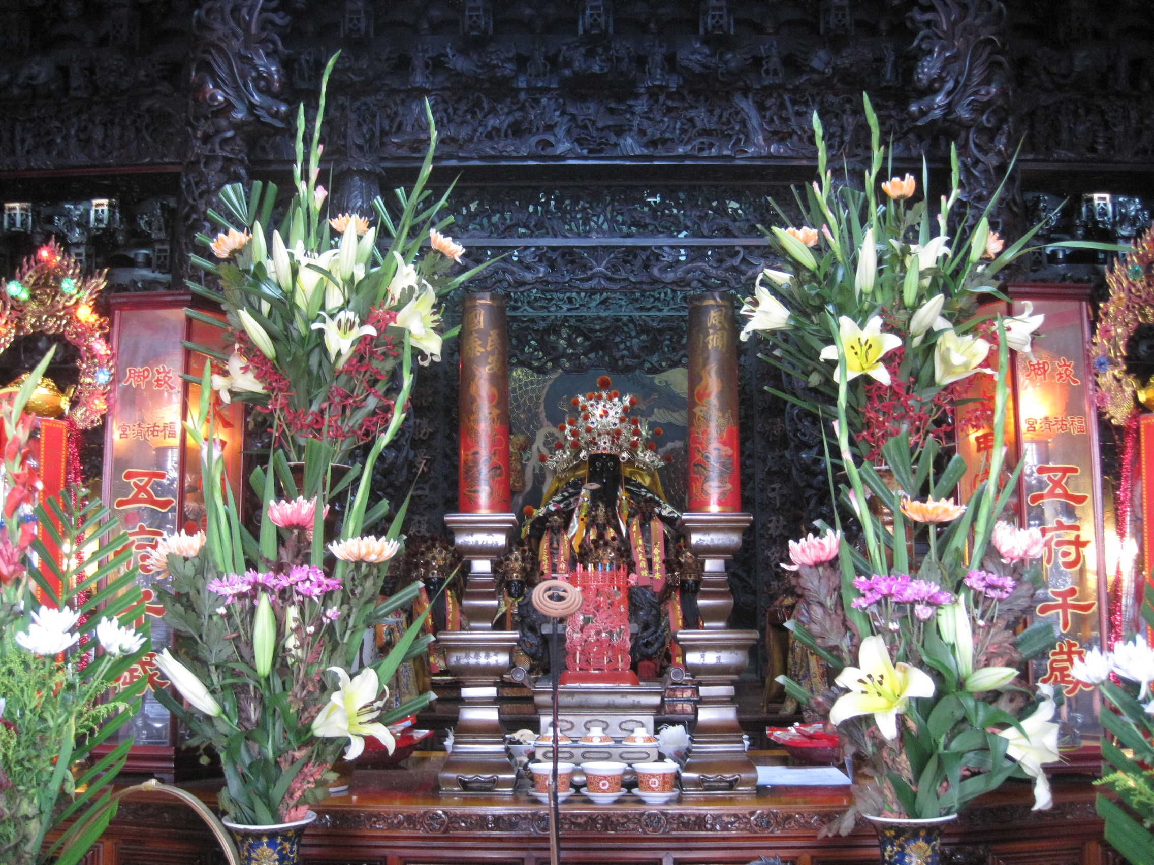 2015年時的崁腳福祐清宮正殿